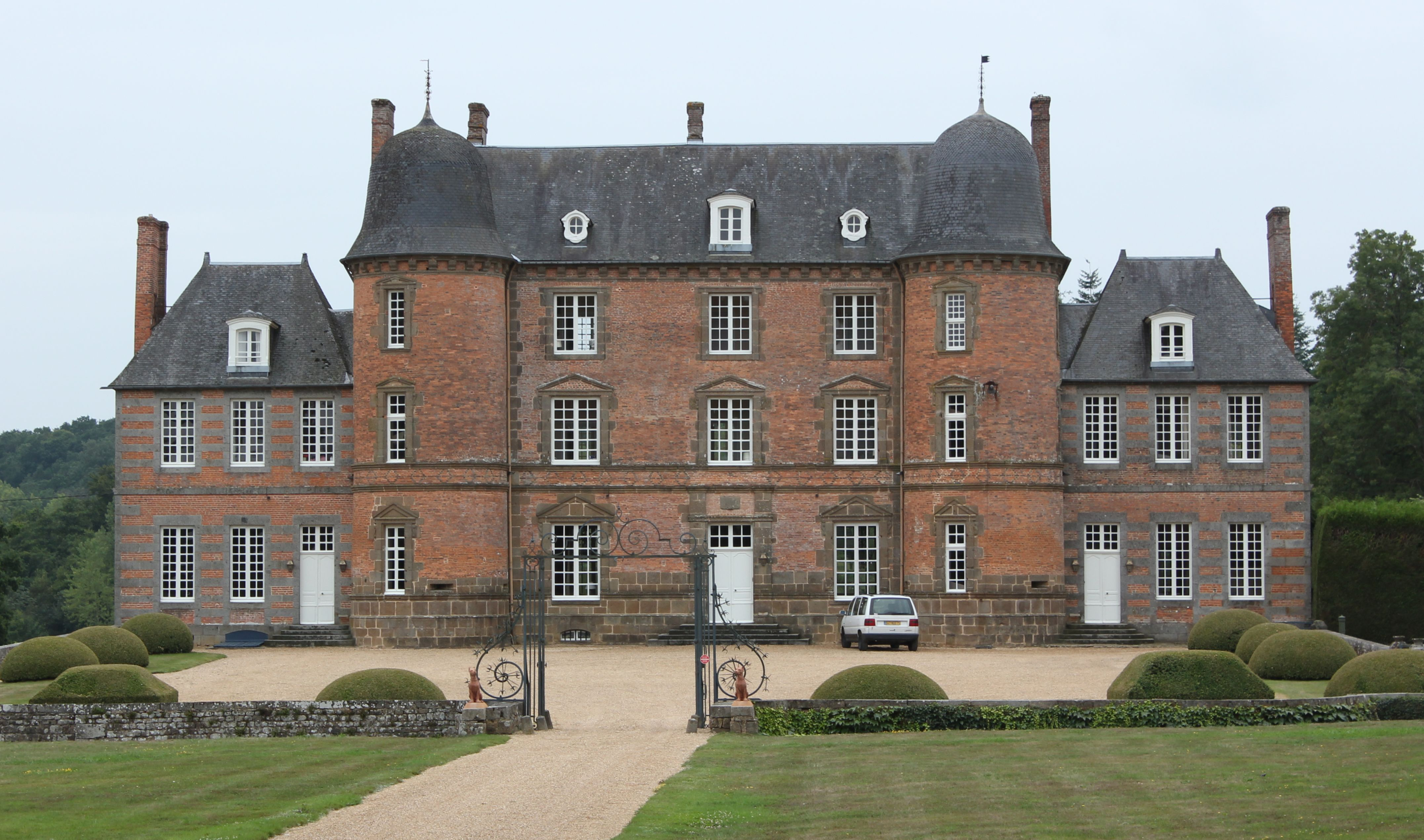 Château de Couterne, Normandie, France